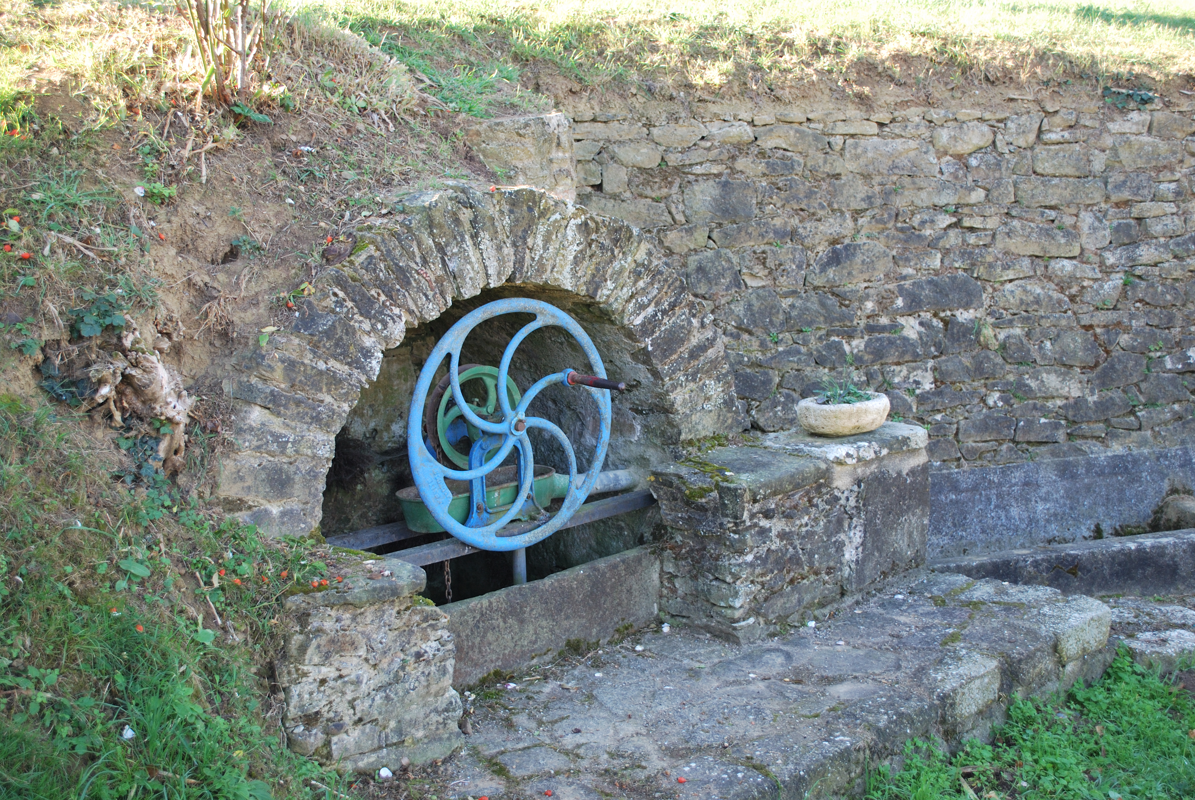 ROUMENGOUS ARIEGE FRANCE A cause de l’absence de cours d’eau, la population avait recours a des citernes, à des puits et des fontaines alimentés par une nappe phréatique Roumengoux possède neuf fontaines. Le circuit des fontaines (8.5 km) peut se faire en famile